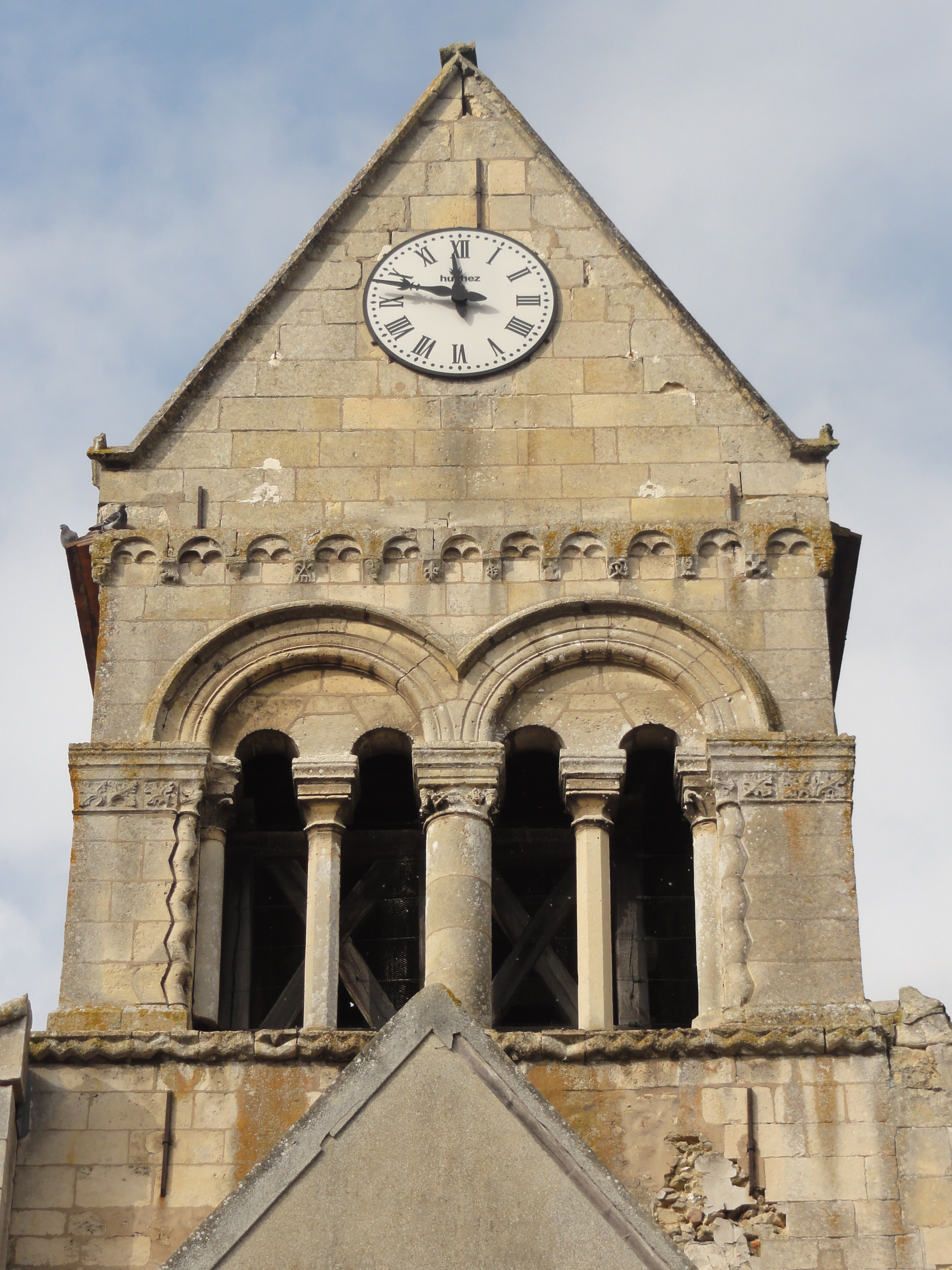 Église Saint-Pierre-et-Saint-Paul de Labruyère - voir titre.